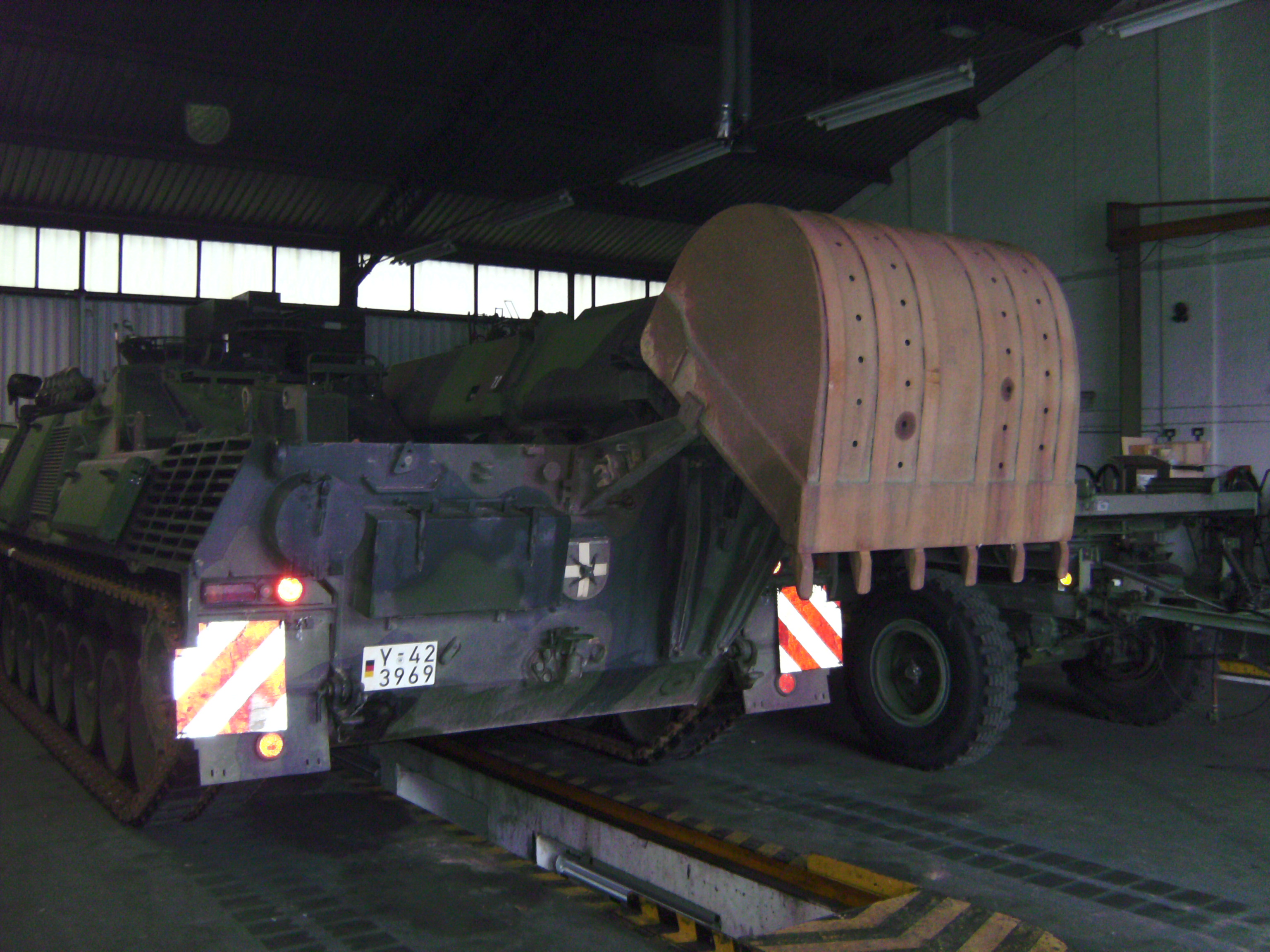 Rückseite